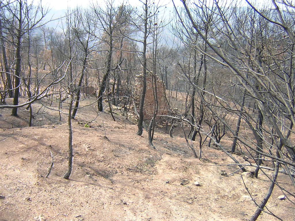 El Casalot de la Llegenda (Monistrol de Calders, Moianès)